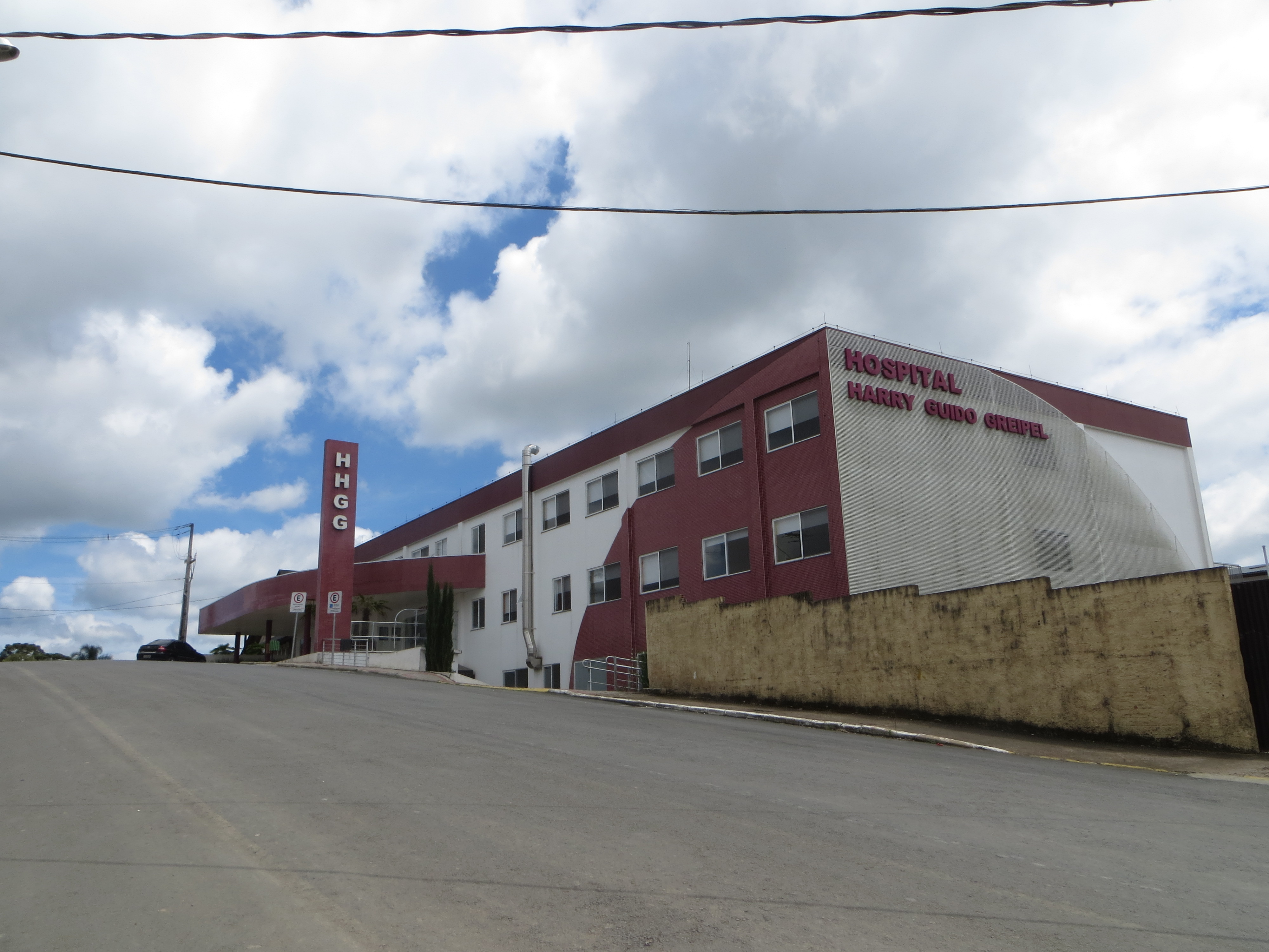 Hospital Harry Guido Greipel em Piên, Estado do Paraná, Região Sul do Brasil.